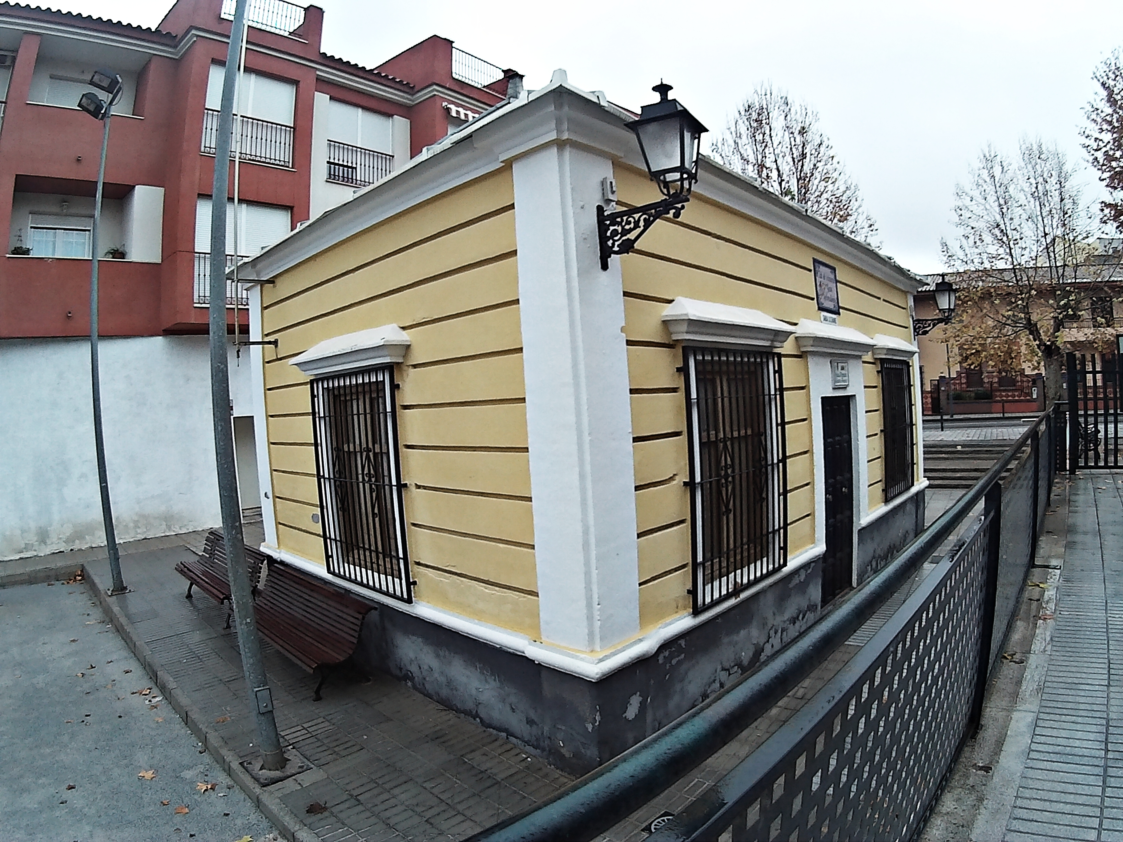 Estación del tranvía en Gabia la Grande